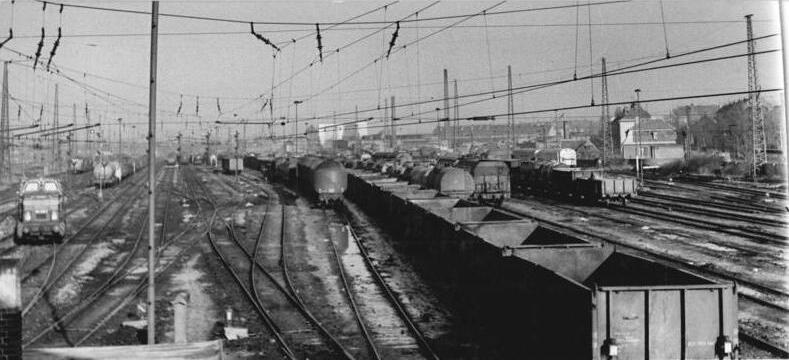 Merseburg, Güterbahnhof Zentralbild Schaar 22.1.71 Bez.Halle-Merseburger Eisenbahner rufen zum Wettbewerb- Die Eisenbahner des Dienstortsbereiches Merseburg-Großkorbetha geben mit ihrem Wettbewerbsprogramm allen 250000 Eisenbahnern der Republik ein Beispiel. Ihr Hauptanliegen ist: Beschleunigung des Warenumlaufs durch sozialistische Rationalisierung. Durch eine einheitliche Transporttechnologie konnten die wagonumlaufzeiten um mehrere Stunden verringert werden. Durch diese Initiative wurde wertvoller zusätzlicher Transportraum geschaffen. Unser Bild zeigt eine Teilübersicht des Güterbahnhofs Merseburg. (Siehe auch K 0122-07-1N und die ADN-Meldungen 1903 u. 1938 v.20.1.71)